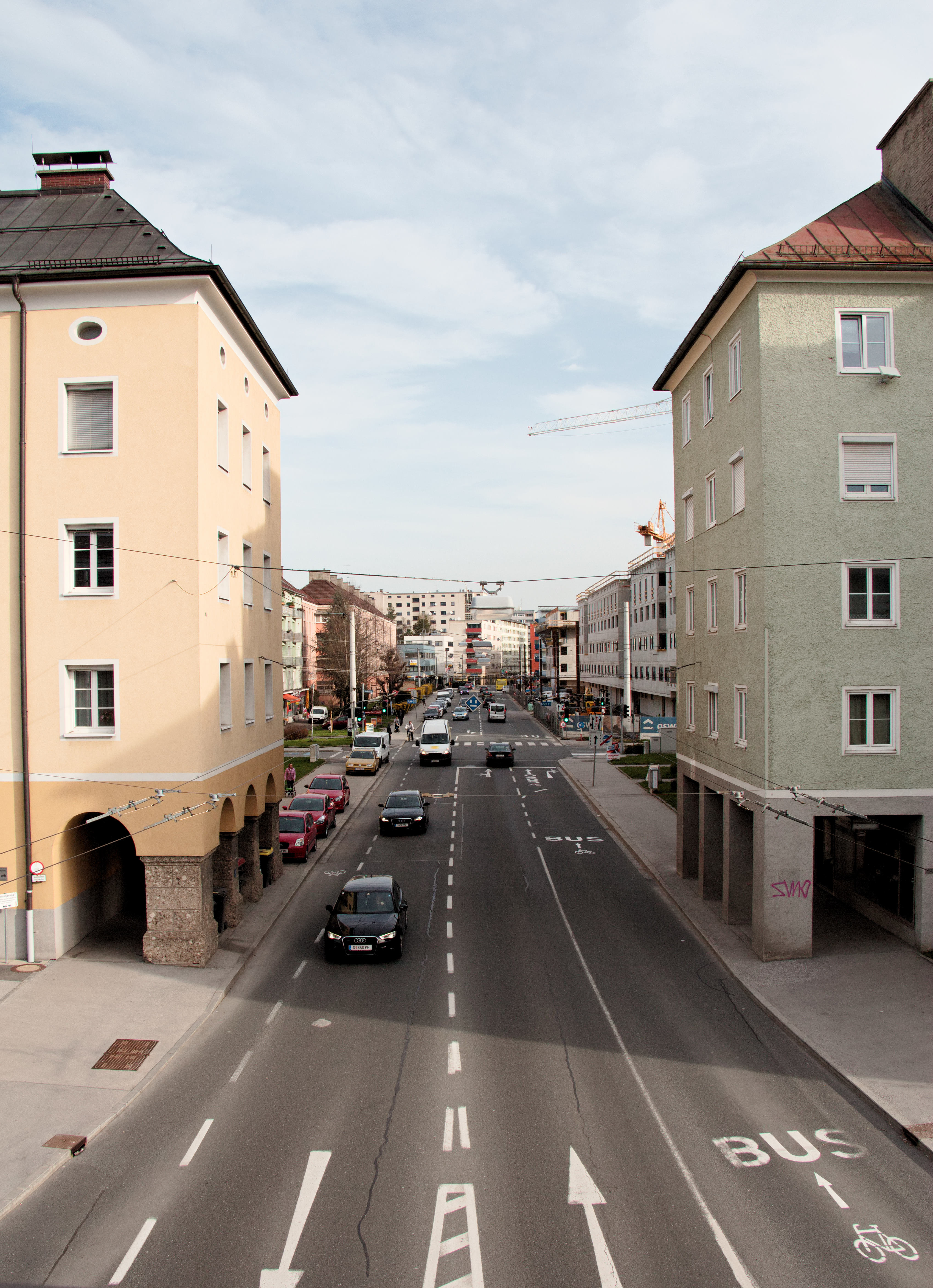 Die Rudolf-Biebl-Straße im Salzburger Stadtteil Lehen; Ansicht von der Radwegbrücke über die Straße bei der S-Bahn-Station Salzburg Aiglhof. Die Straße ist gleichzeitig Teil der Wiener Straße B 1.